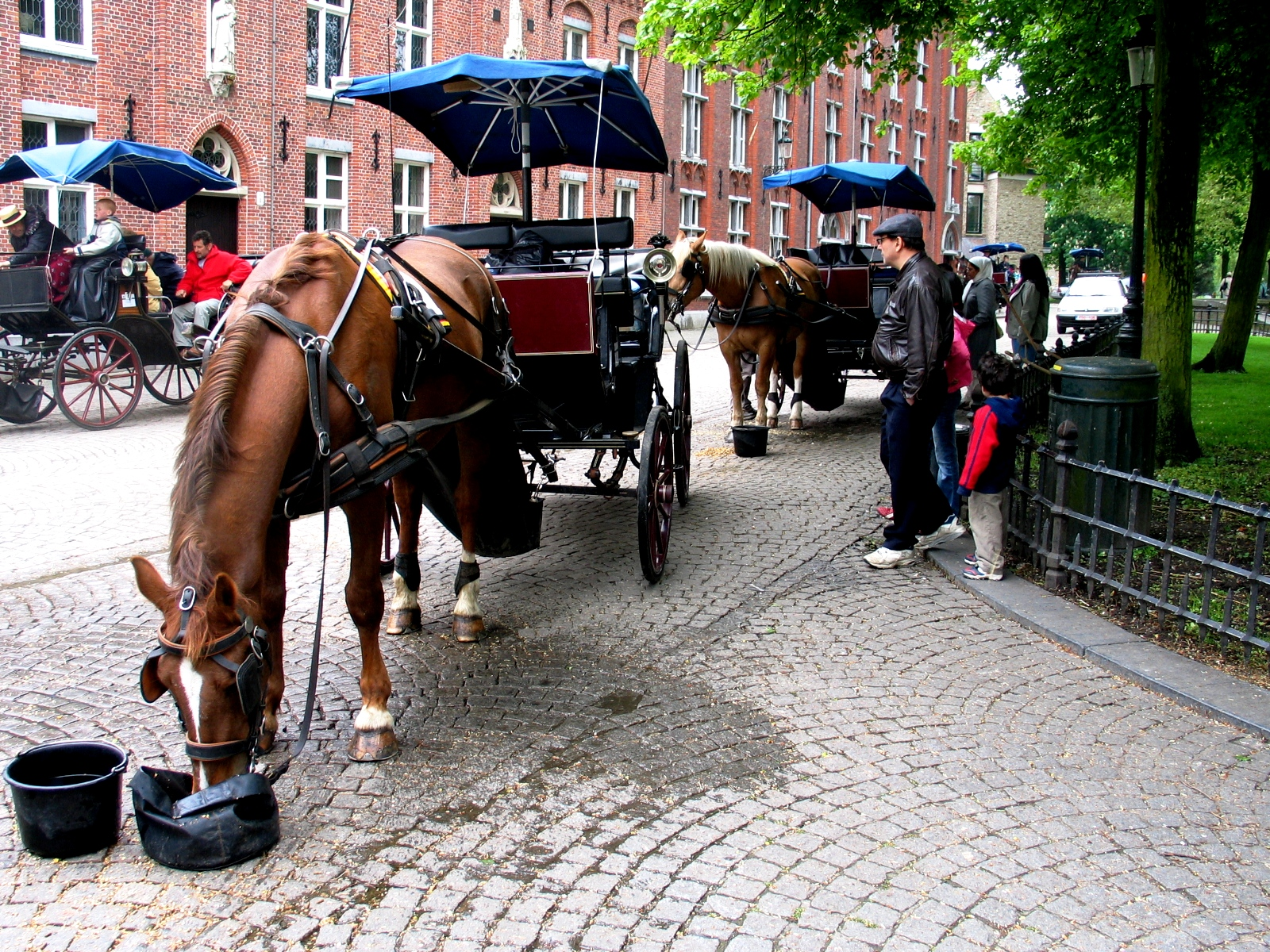 paardenkoets in Brugge - eigen foto